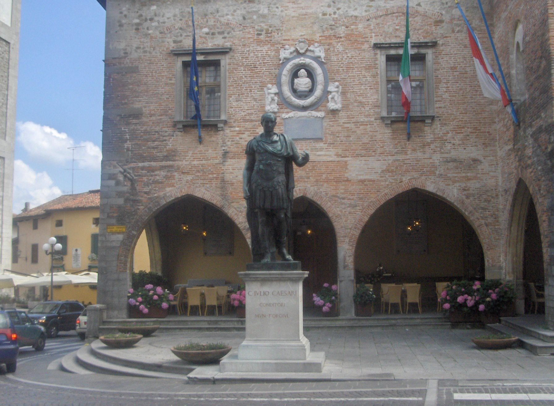 Sebi1, Cividale del Friuli - Statua di Giulio Cesare